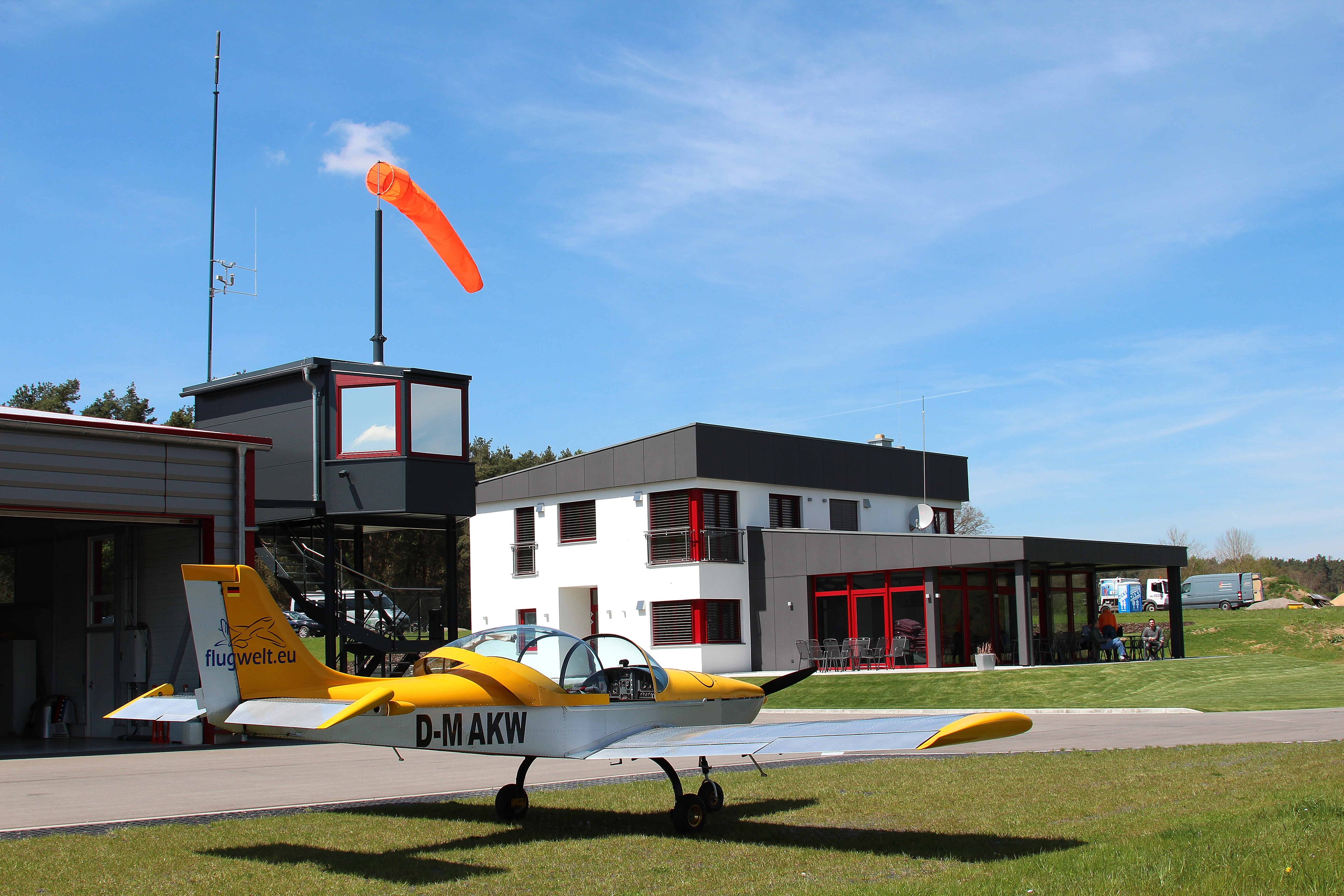 Flugplatz Bruck; Bruck, Landkreis Schwandorf, Oberpfalz, Bayern